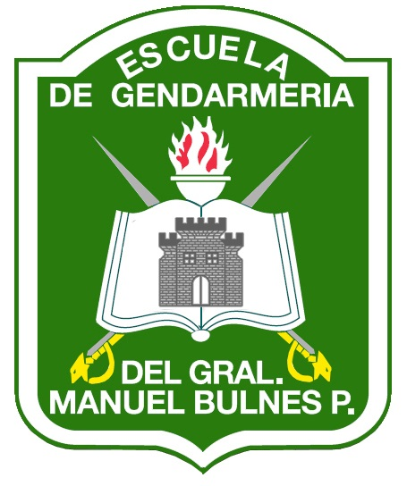 Escudo Escuela de Gendarmería de Chile